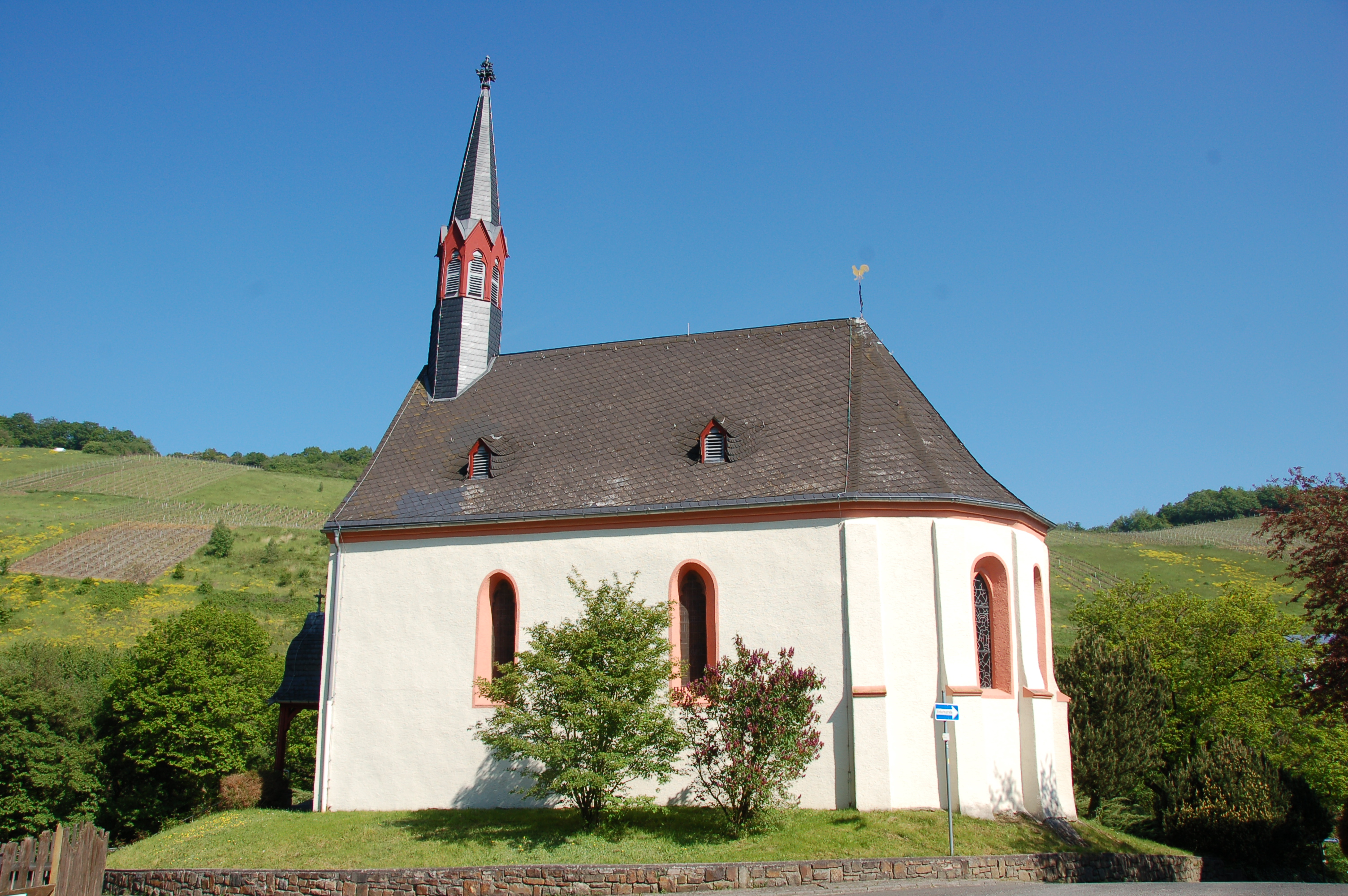 im Kern mittelalterlicher Saalbau, 1886 überformt